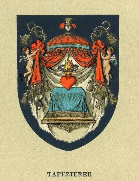 Wappen der Tapezierer (Wappen der Wiener Gewerbegenossenschaften, um 1900)